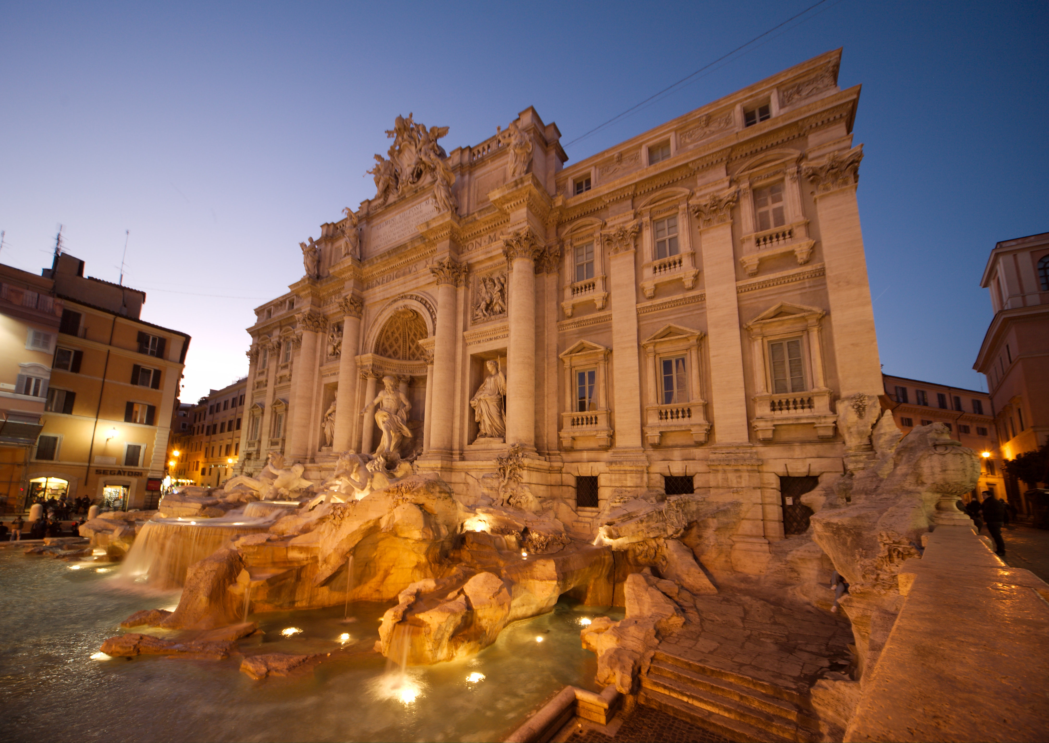 Trevibrunnen zur blauen Stunde